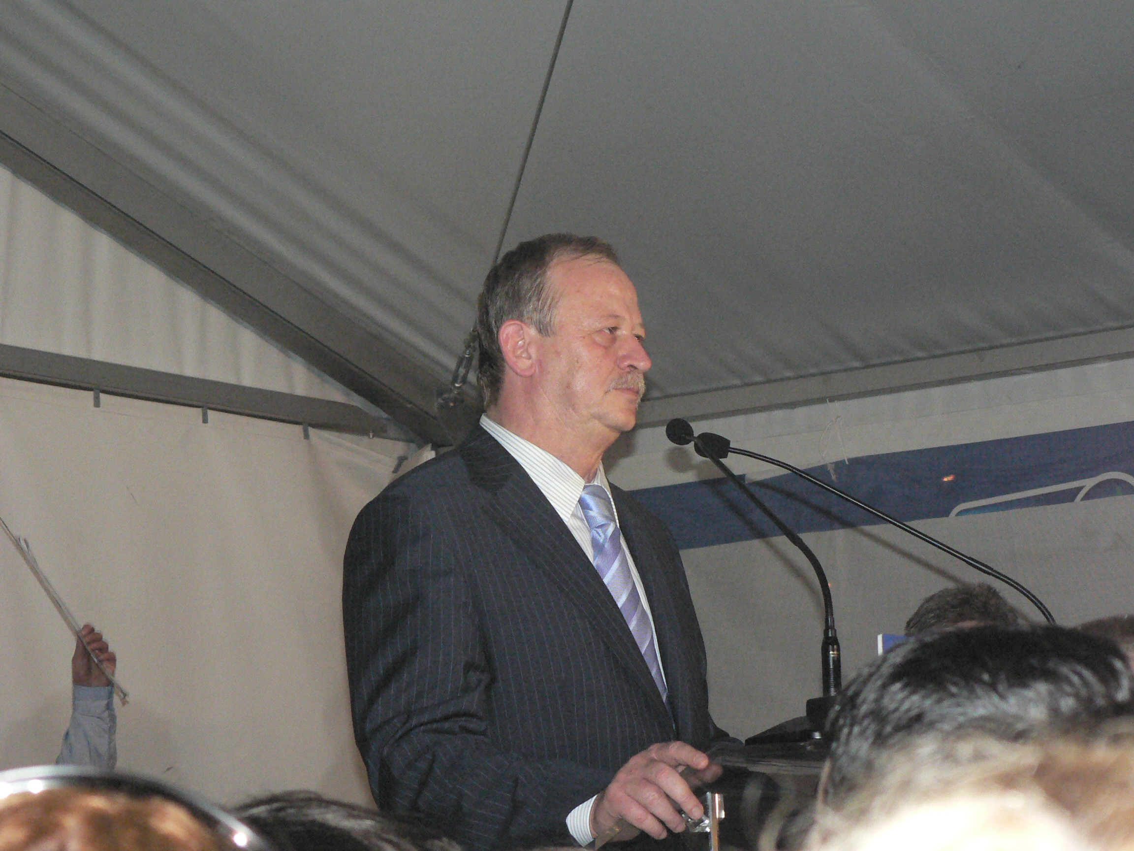 A felvétel 2006. április 23-án készült Budapesten, a Városháza (Fővárosi Önkormányzat) előtti téren levő Liberális sátorban. A Szabad Demokraták Szövetsége és a Magyar Szocialista Párt aktivistái a választási eredményeket várták. Az eredmény kihirdetése után Gyurcsány Ferenc, Kuncze Gábor, Iványi Gábor szólt a megjelentekhez. A felvétel Panasonic DMC-FZ4 fényképezőgéppel készült. Megjelent a Metapolisz 1 (választás) DVD-n. ISBN 963-229-987-6 ©© Derzsi Elekes Andor, Budapest 2014, You are authorised to use these photos and vids under Creative Commons – even for commercial, for profit purposes. Photos must be attributed to Derzsi Elekes Andor. All of the photos and vids in the Metapolisz DVD line are under Creative Commons and can be used even for commercial – for profit – purposes. Recommended Citation Derzsi Elekes Andor: Metapolisz DVD line